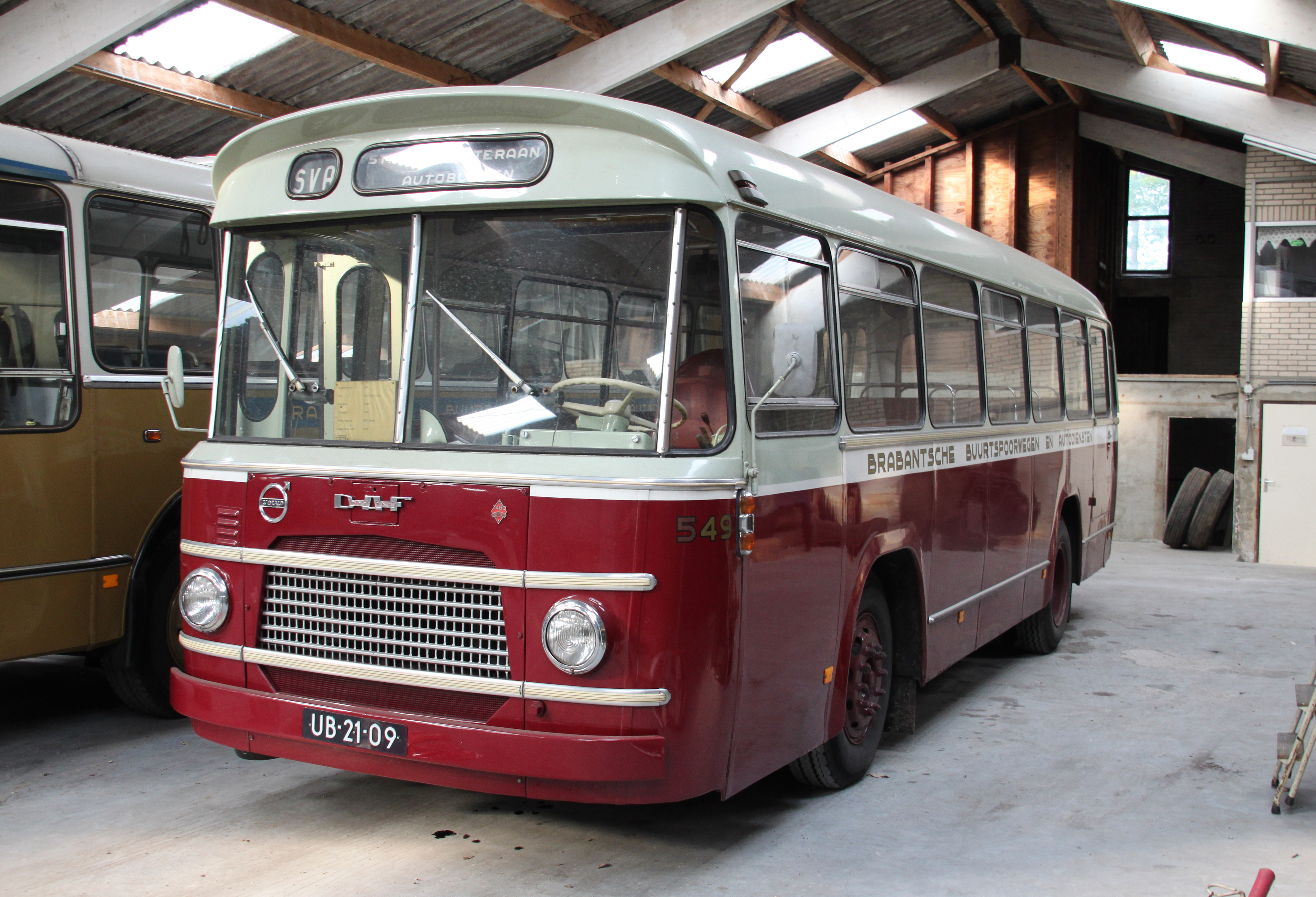 BBA bus 549 van het type Volvo-Zabo VZ CC uit de jaren 60 , nu in de collectie van de Stichting Veteraan Autobussen.